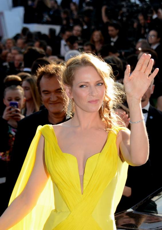 Uma Thurman au festival de Cannes